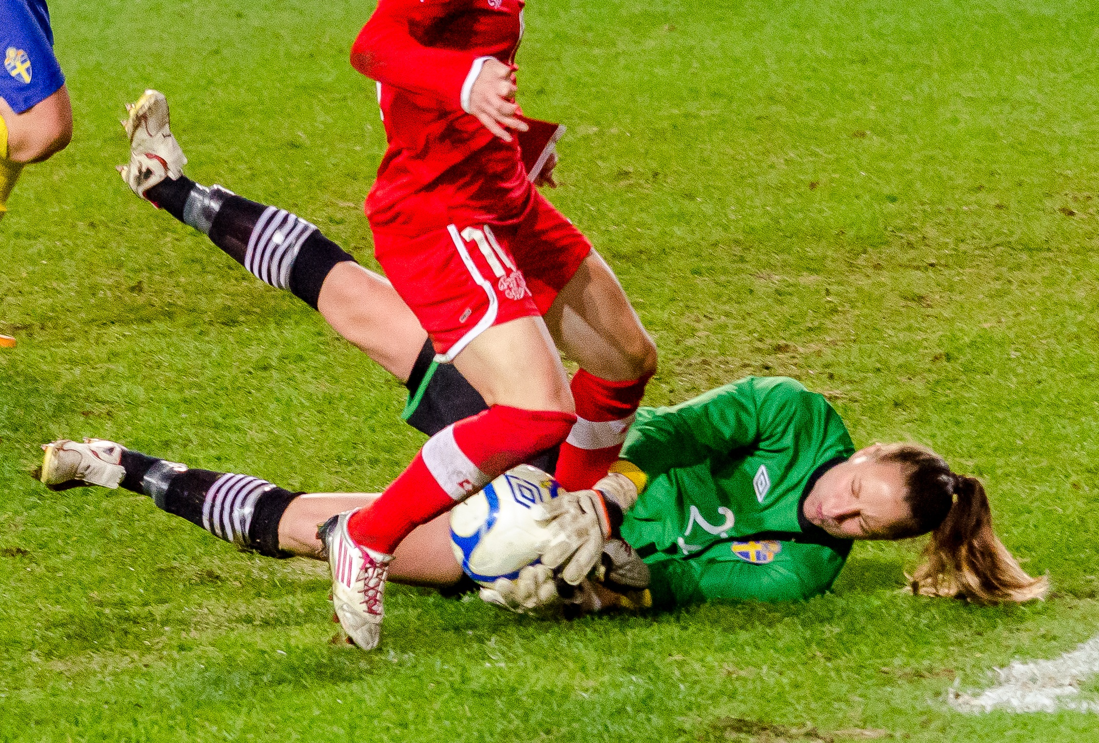 Den svenska målvakten Sofia Lundgren i den första landskampen på Myresjöhus Arena (tillika Pia Sundhages debut som svensk förbundskapten) 23 oktober 2012, där Sverige slog Schweiz med 3-0 inför 4905 åskådare.